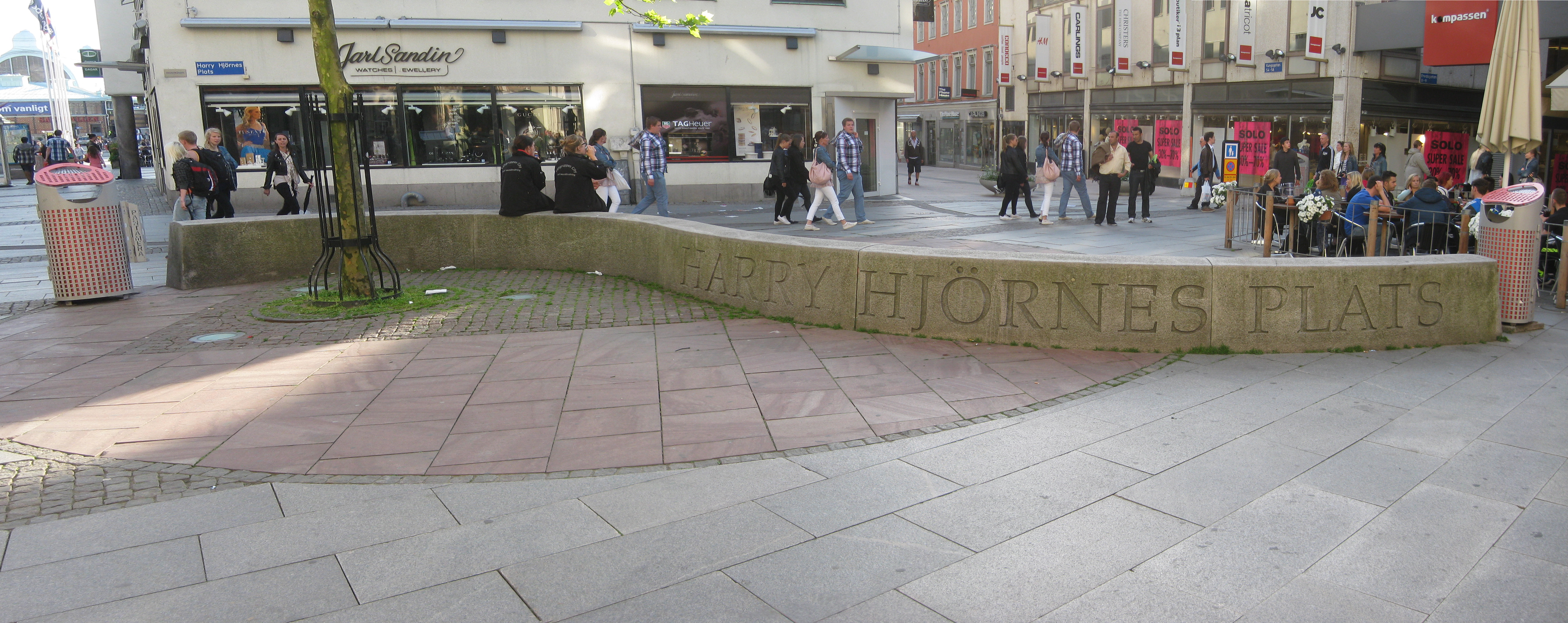 Harry Hjörnes plats i Göteborg.